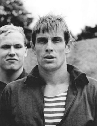 Peter Rund